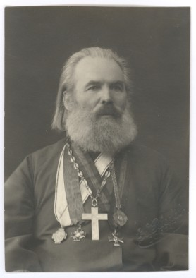 Arseni Semjonovitš Tsarevski